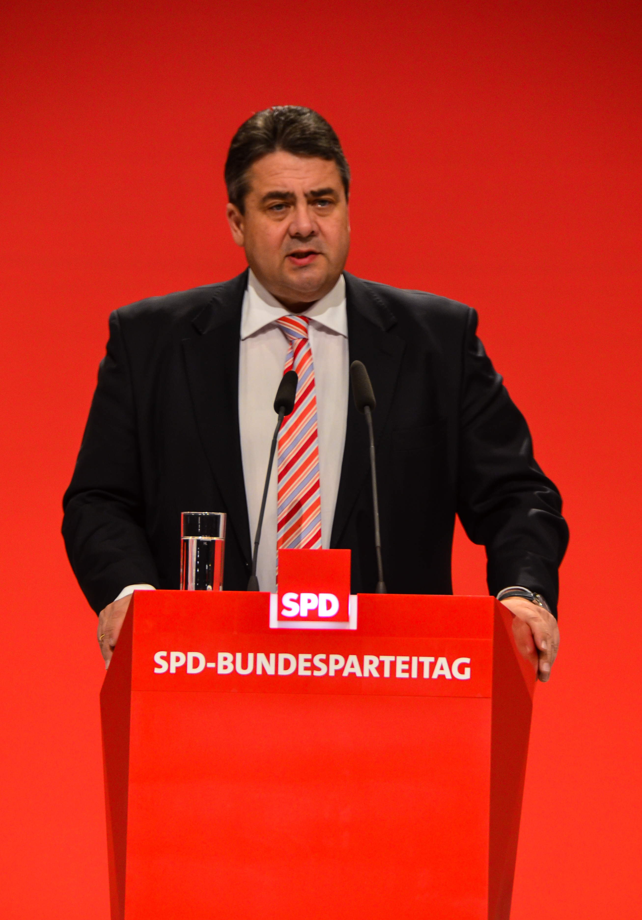 SPD Bundesparteitag 2013 in Leipzig (14.-16. November 2013); Neue Messe